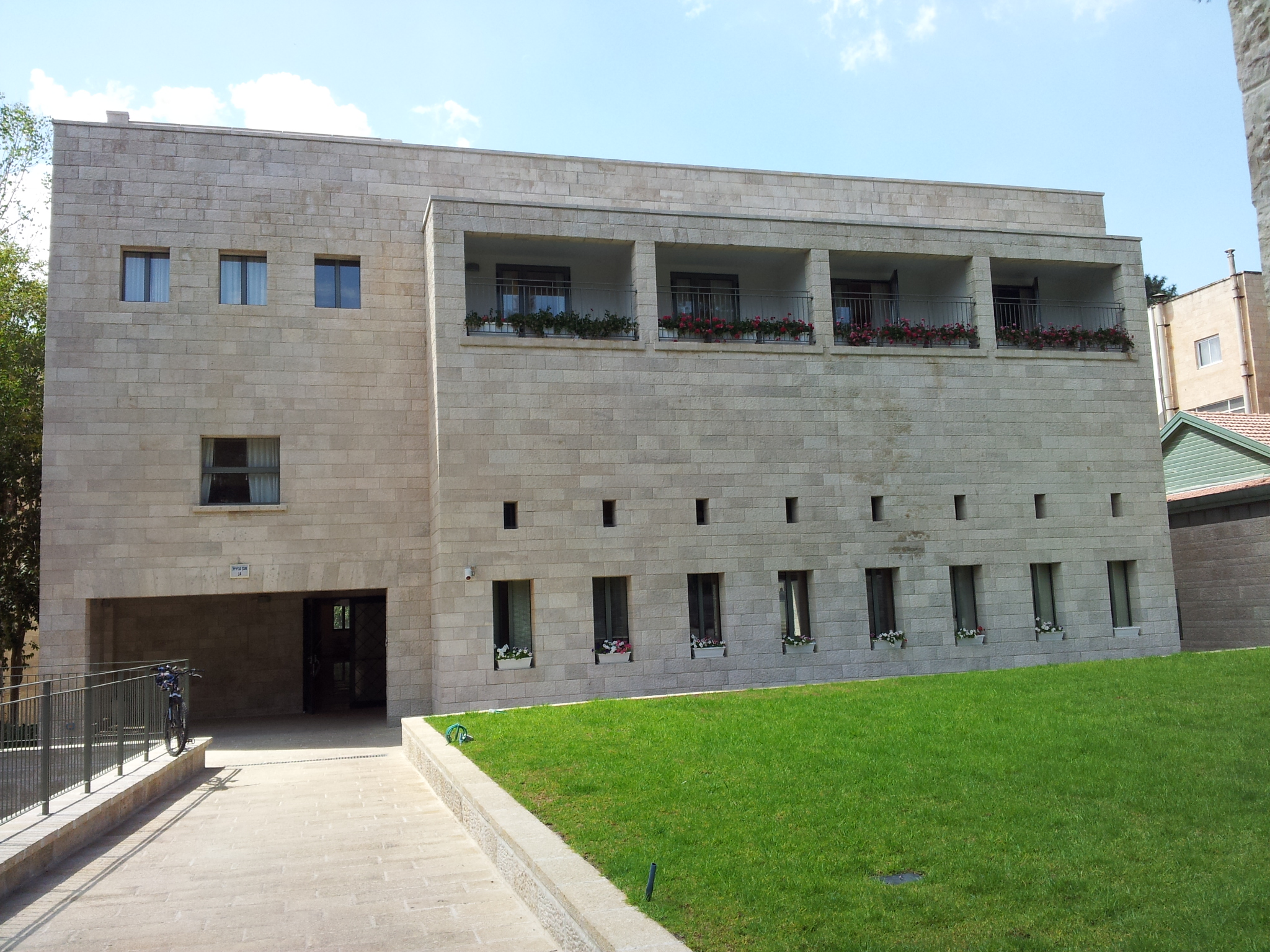 מראה במתחם יד יצחק בן צבי (בית החלוצות) בירושלים